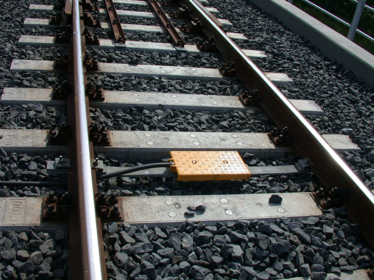 schaltbare Balise für das ETCS (European Train Control System)